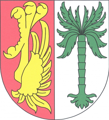 znak, Obořiště, okres Příbram